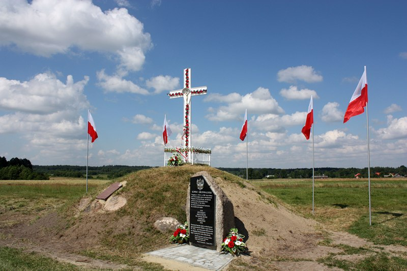 Kopiec grunwaldzki w Majdanie Sieniawskim